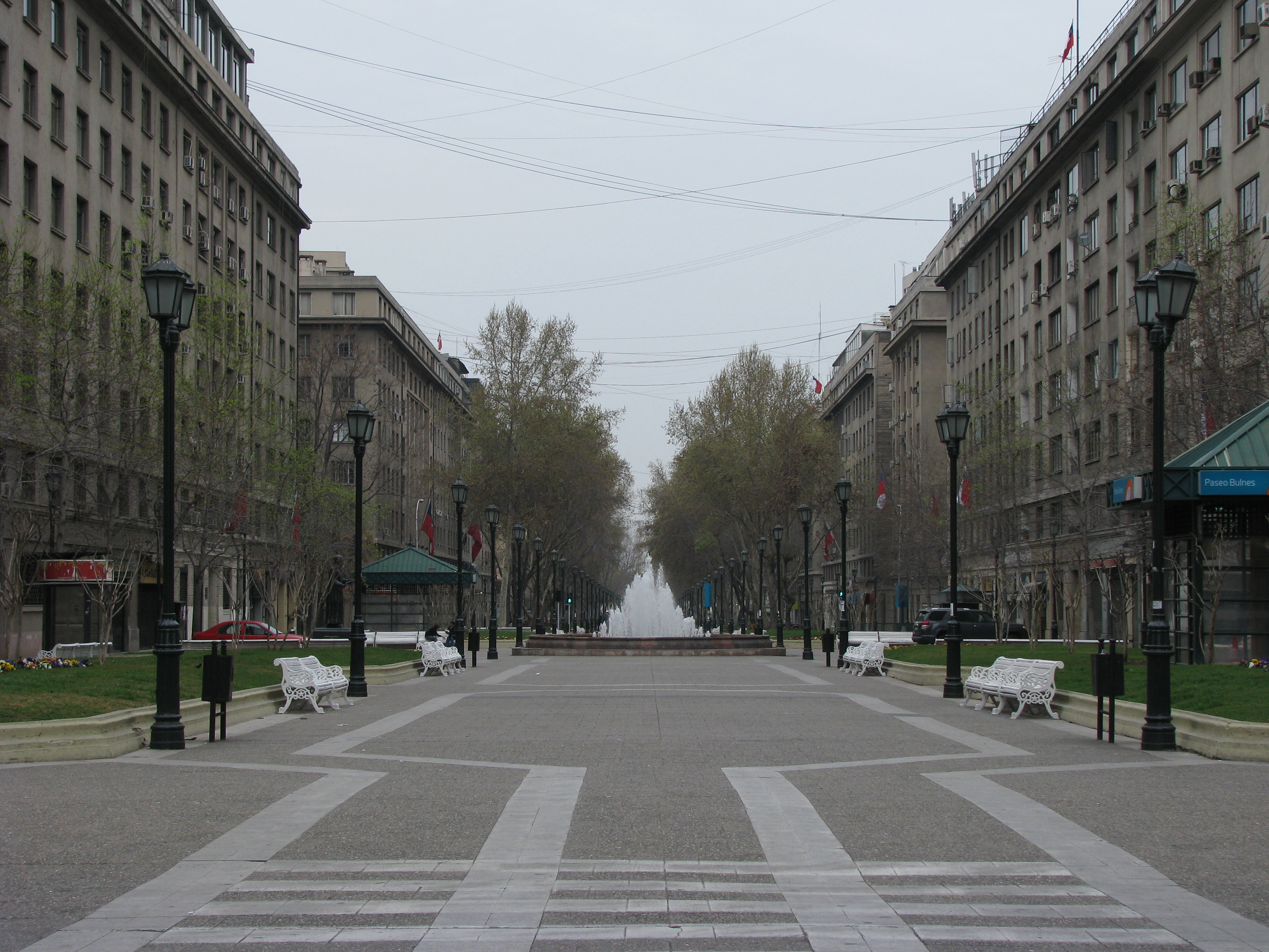 Barrio Cívico, Eje Bulnes y Parque Almagro This is a photo of a national monument in Chile: 2017